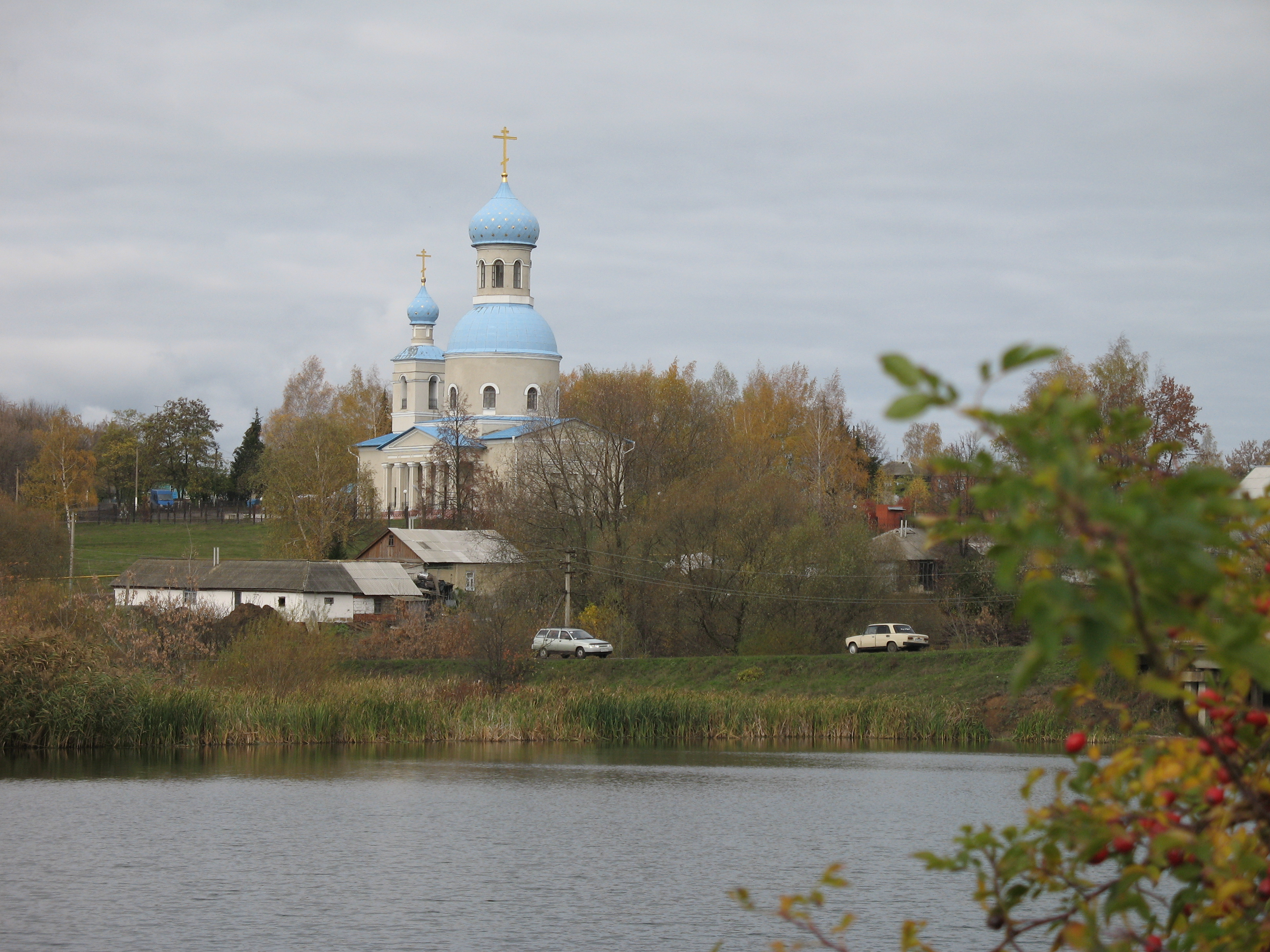 Архангельская церковь (Белгородская область, Губкин, село Архангельское)